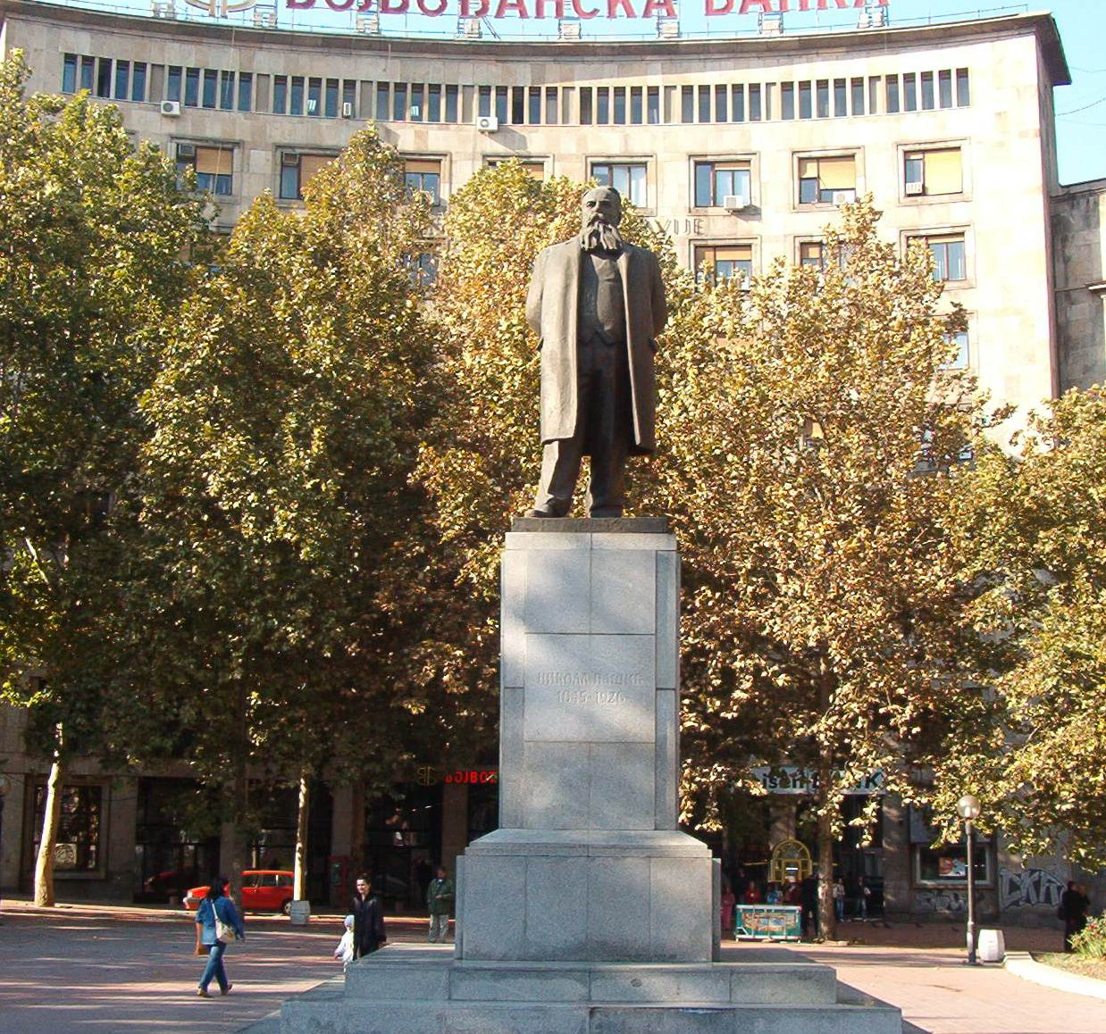 Никола Пашић, државник Licensing Fotografisao Goldfinger. U javnoj upotrebi!